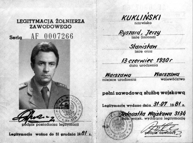 Last army ID of colonel Ryszard Kukliński